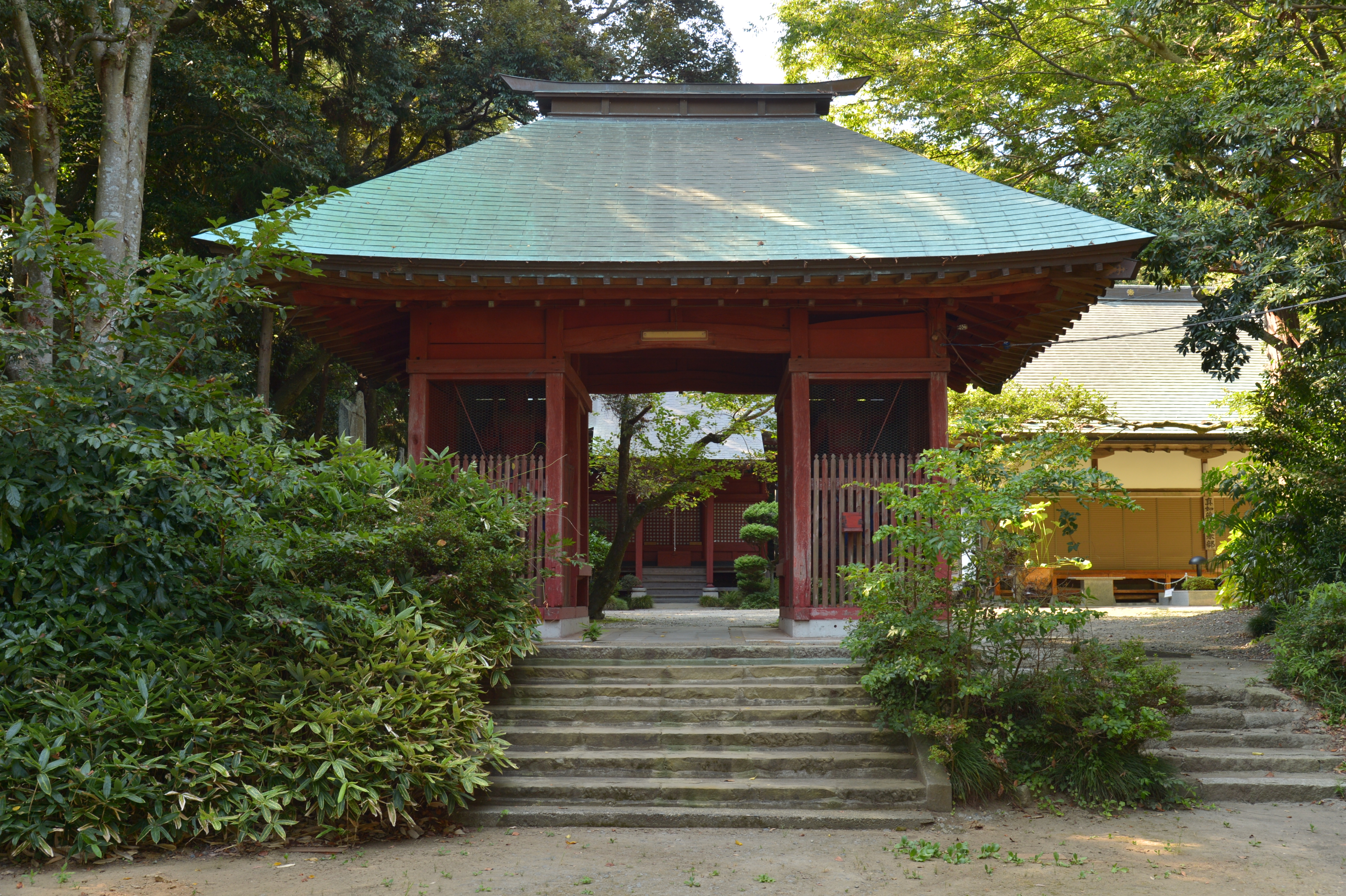 歩崎観音（宝性院歩崎山長禅寺）の仁王門。茨城県かすみがうら市坂にて。